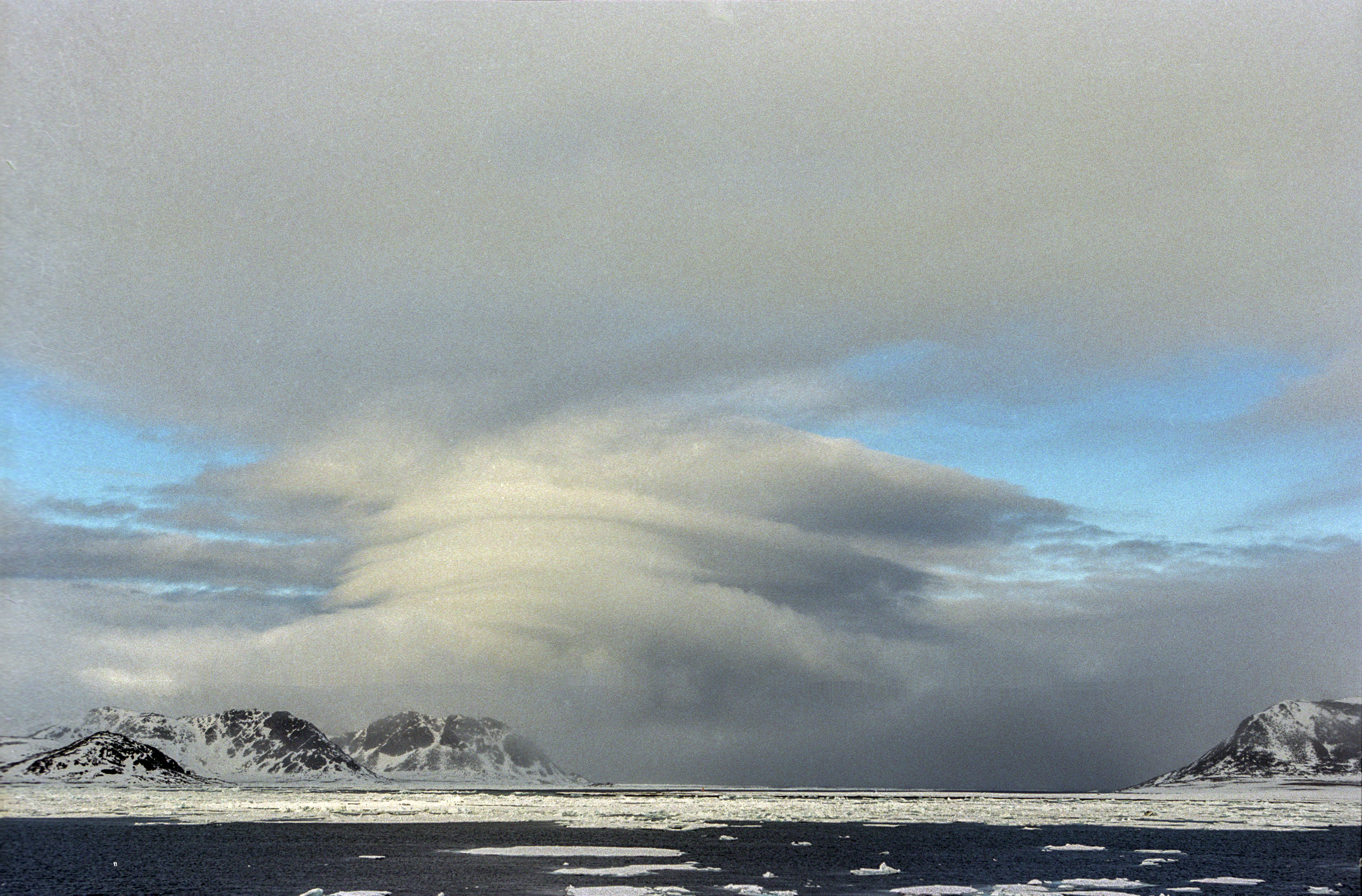 Svalbard